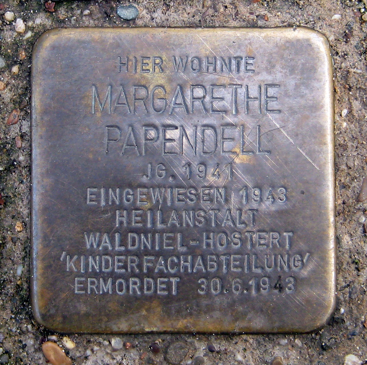 Stolperstein, Inrather Str. 145, Krefeld